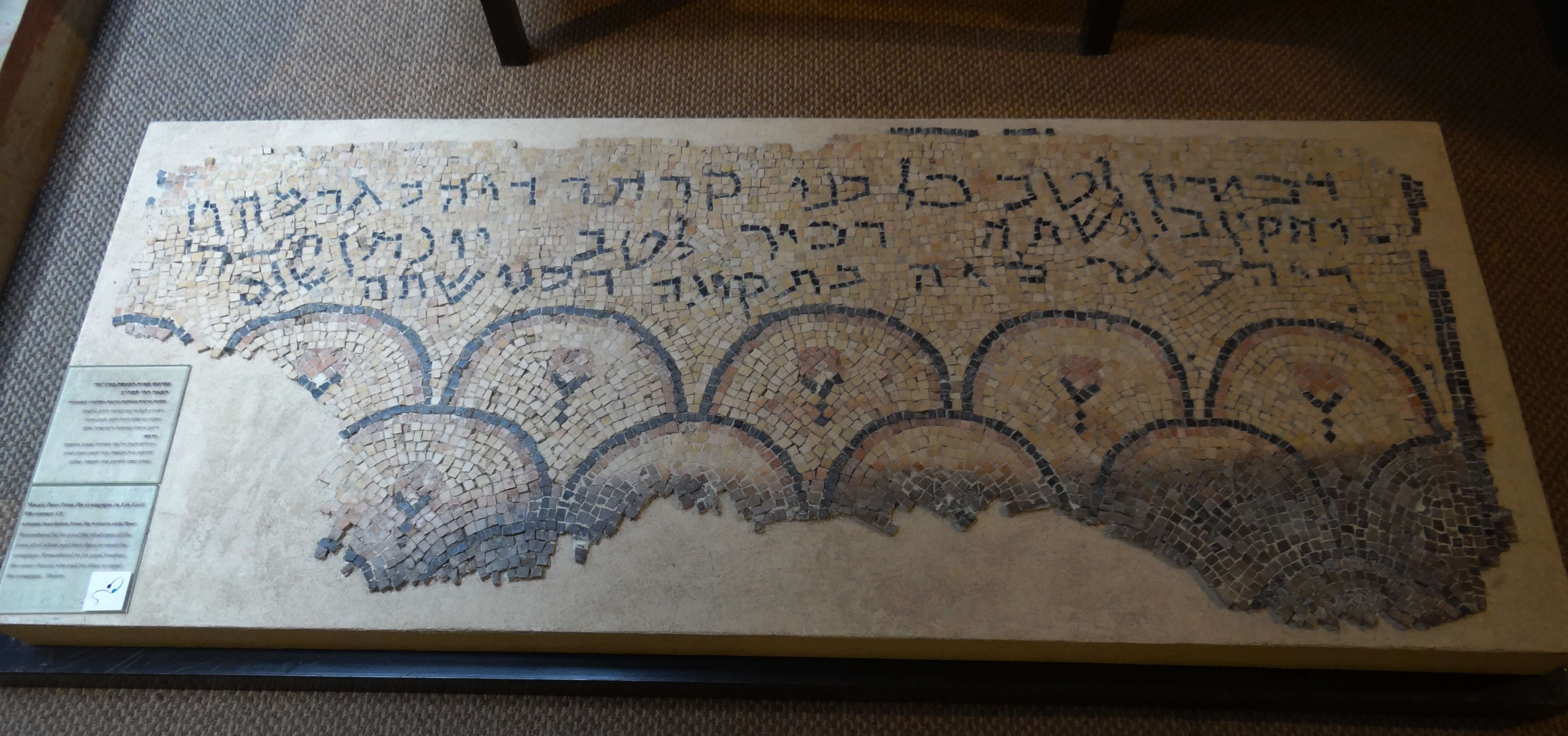 כתובת תודה לתורמים לתיקון בית הכנסת בארמית מבית הכנסת בעין גדי דכירי לטב כל בני קרתה דיהב גרמהון ותקים כנישתה דכיר לטב יונתן חזנה דיהב גרמיה בתקונה דכנישתה שלם פירוש בעברית זכורים לטוב כל בני העיירה שנתנו מכספם לתיקון בית הכנסת זכור לטוב יונתן החזן שנתן כספו לתיקון בית הכנסת השלום מוצג במוזיאון הכט בחיפה